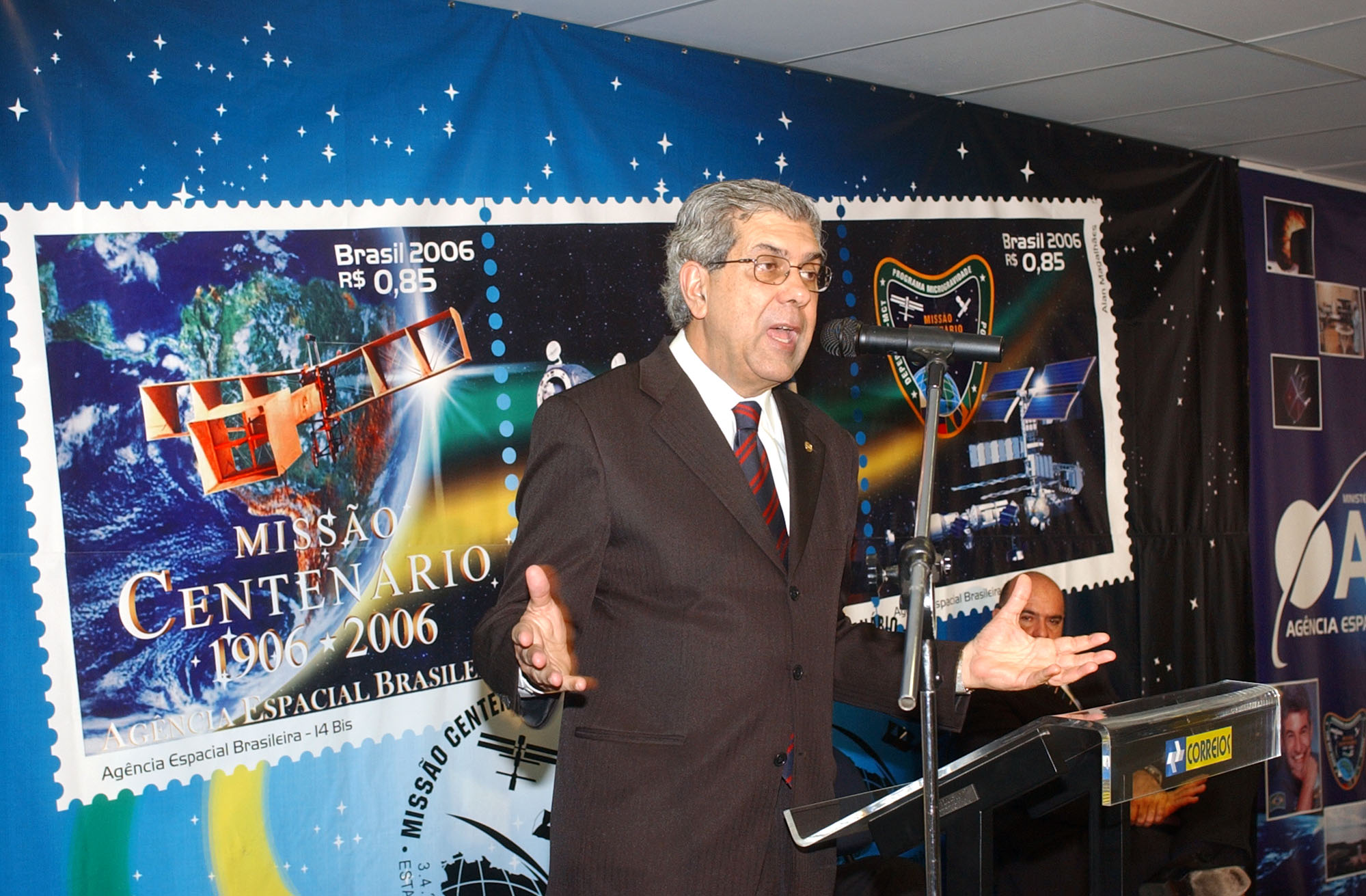 Brasília - O presidente da AEB, Sérgio Goudenzi, discursa durante cerimônia de lançamento oficial de selo comemorativo ao primeiro vôo espacial de um brasileiro, o astronauta Marcos César Pontes, e uma medalha produzida pela Casa da Moeda.